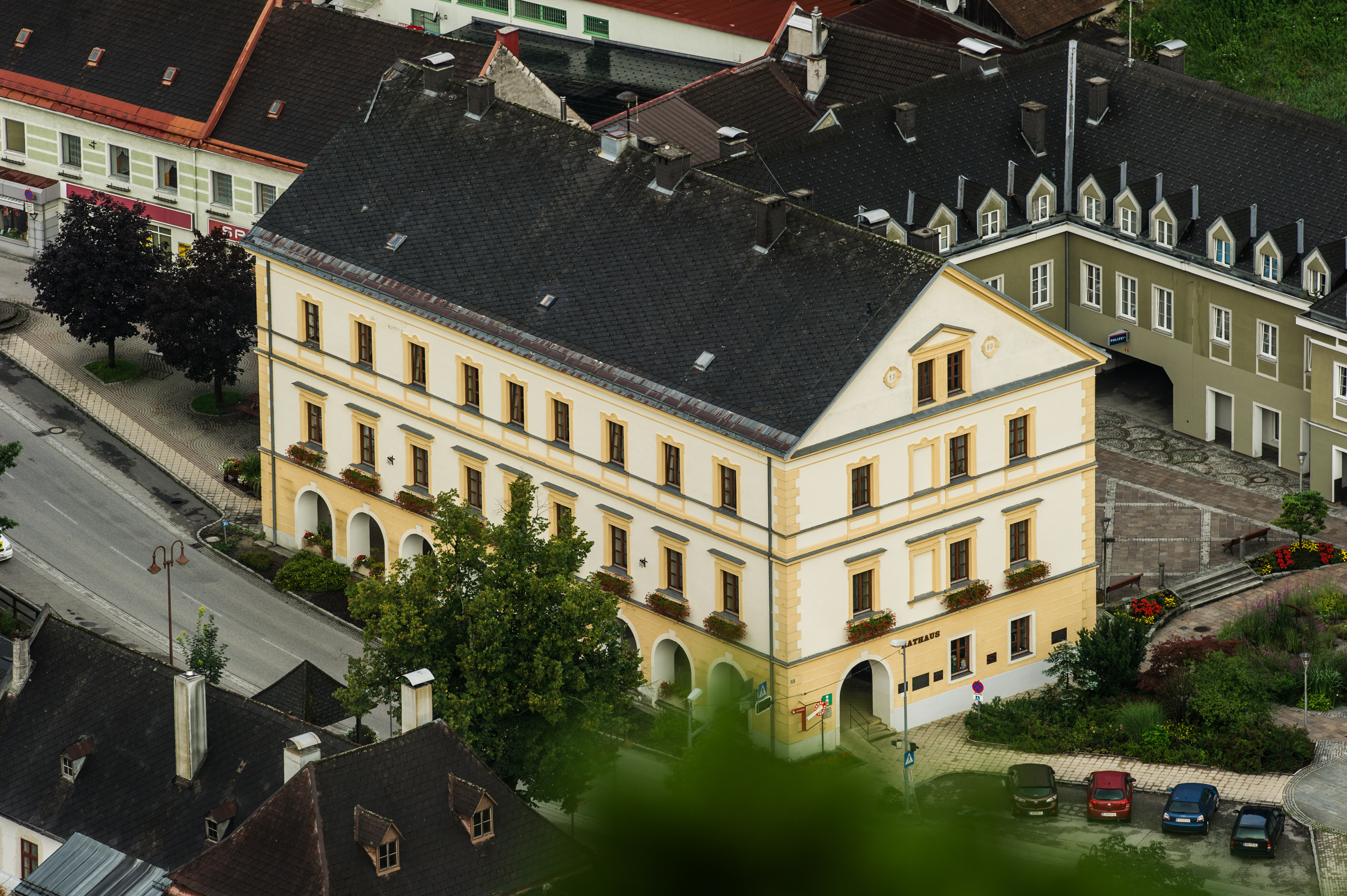 Rathaus